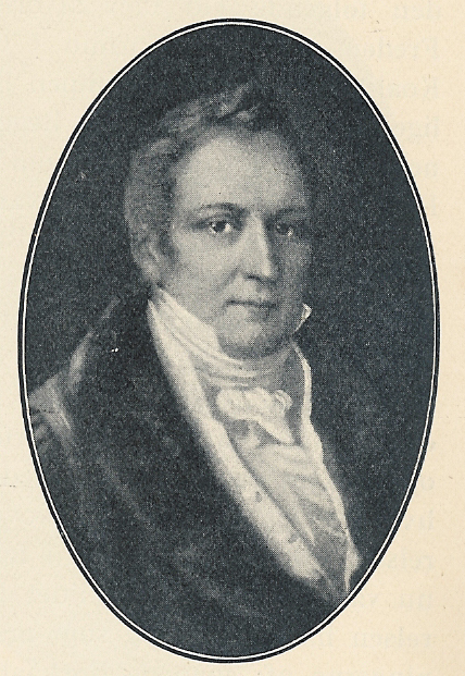 Udenrigsminister Christian Bernstorff. 1769-1835.